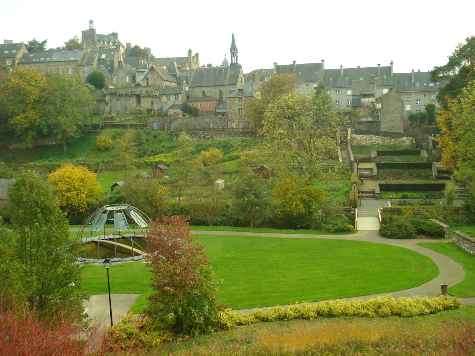 Fougères - Novembre 2011